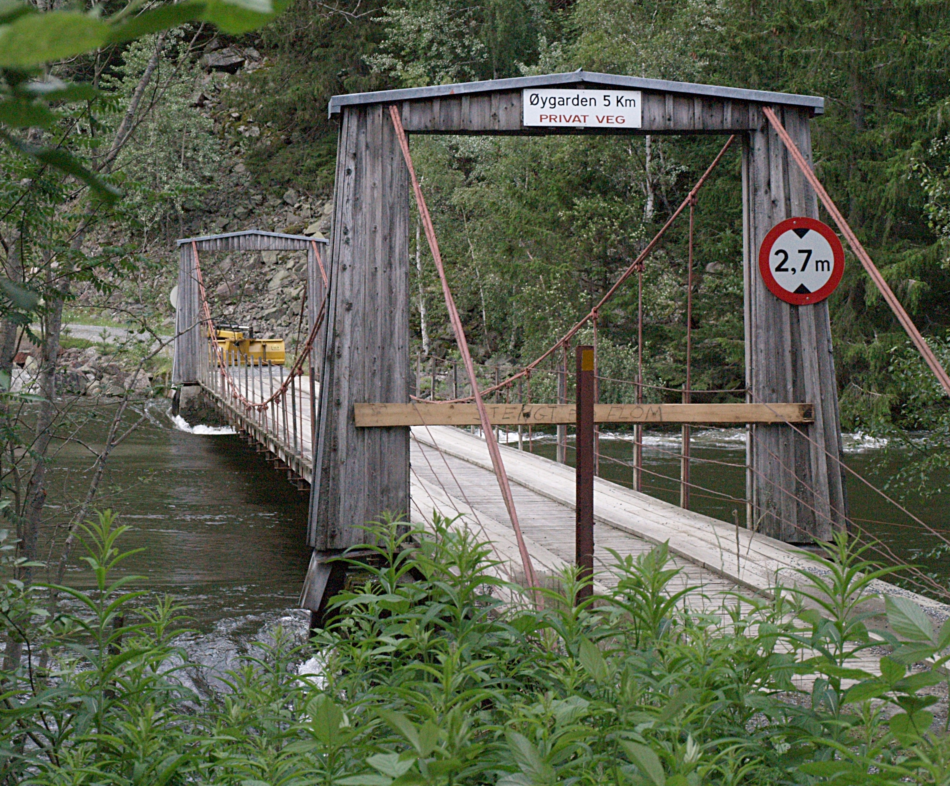 Hengebru ved Islandsmoen under flomvannsføring i Begna. Broen er stengt på dette tidspunktet.